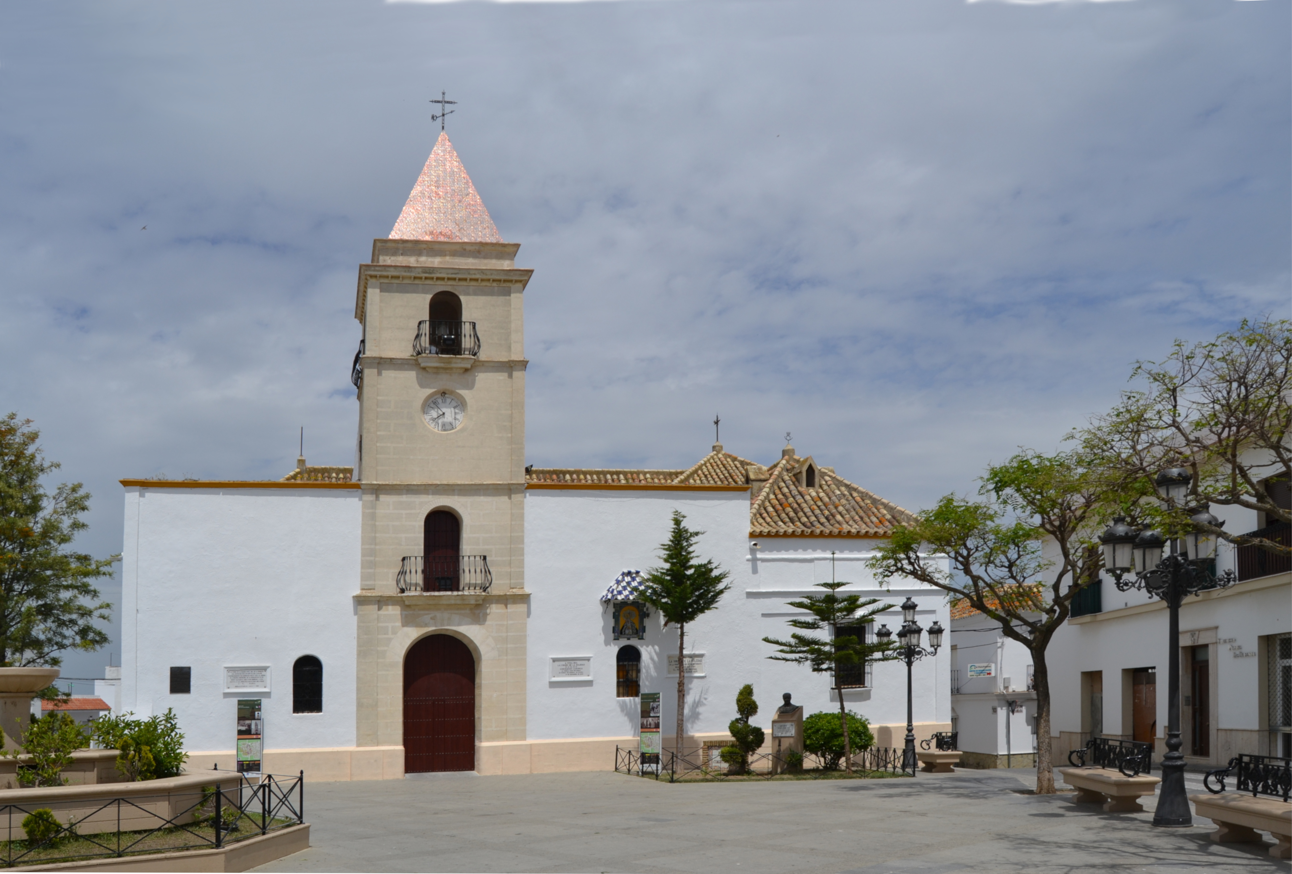 Paterna de Rivera, Iglesia Nuestra Señora la Inhiesta en la Plaza de la Constitución